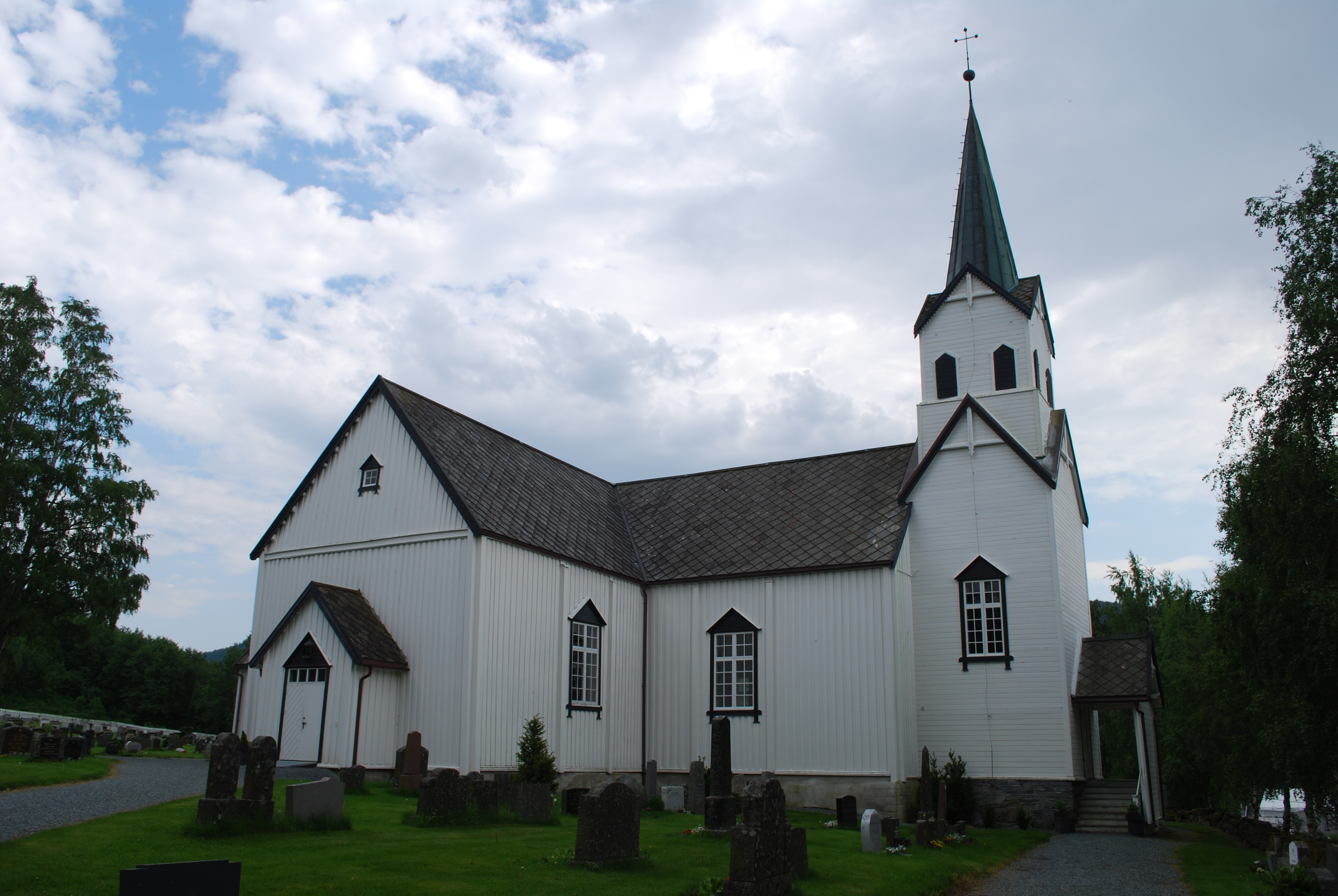 Hegra kirke i Hegra (Stjørdal), Nord-Trøndelag